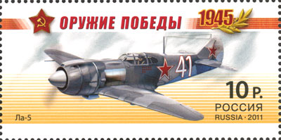 Почтовая марка России